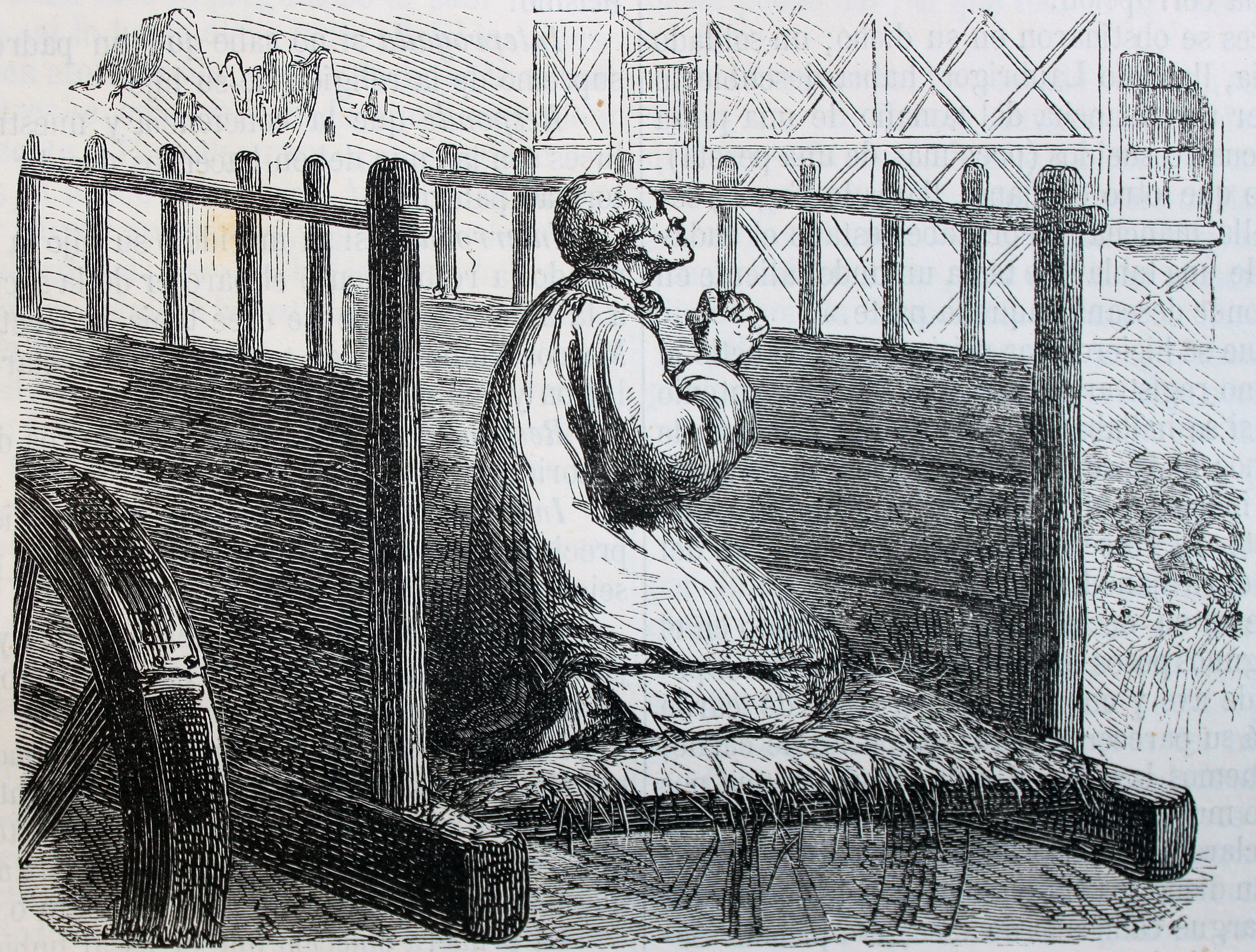 Ilustraciones de la obra : Anales dramáticos del crimen ó Causas célebres españolas y estranjeras [sic] / estractadas [sic] de los originales y traducidas, bajo la dirección de José de Vicente y Caravantes. - Madrid : Imprenta de Fernando Gaspar [etc.], 1858-1866. - Ed. il. con grabados... "Causa contra la familia de Calas, de Tolosa de Francia (1762). Pidió que le dejaran arrodillar en la carreta del verdugo, y bendecir su morada".